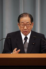 Minister Tetsuo Kutsukake.